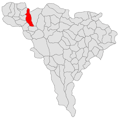 Categorie:Hărţi ale judeţului Alba